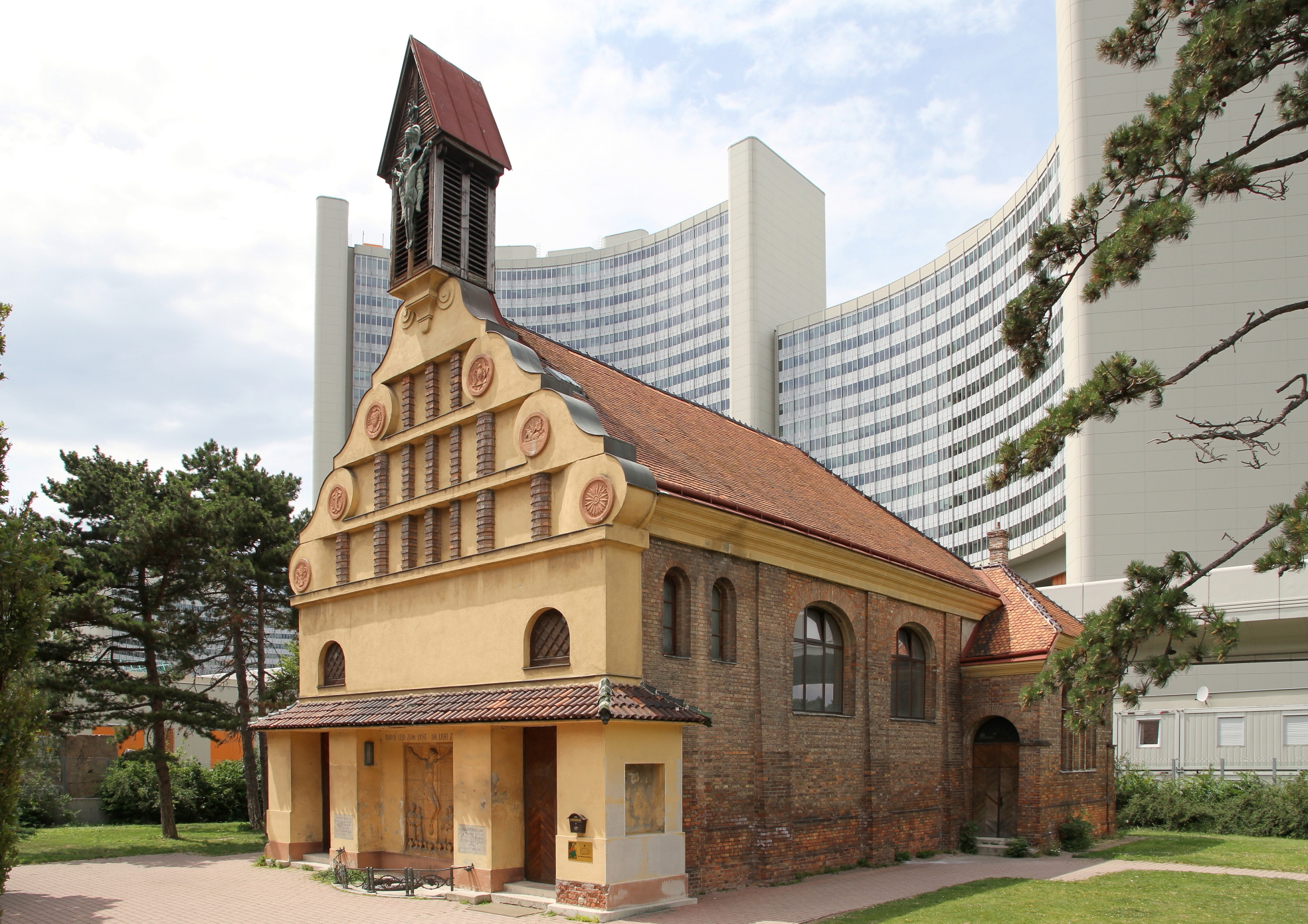 Die Koptische Markuskirche im Wiener Bezirk Donaustadt (22. Bezirk, Wagramerstraße 17 A). Im Hintergrund das Vienna International Centre.